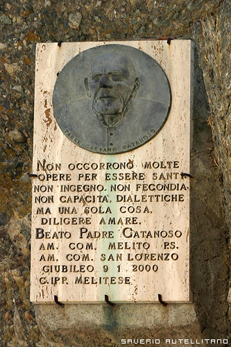 Targa commemorativa a San Gaetano Catanoso presso la piazza di Pentedattilo